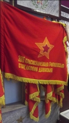 Banner of 306 Infantry Division